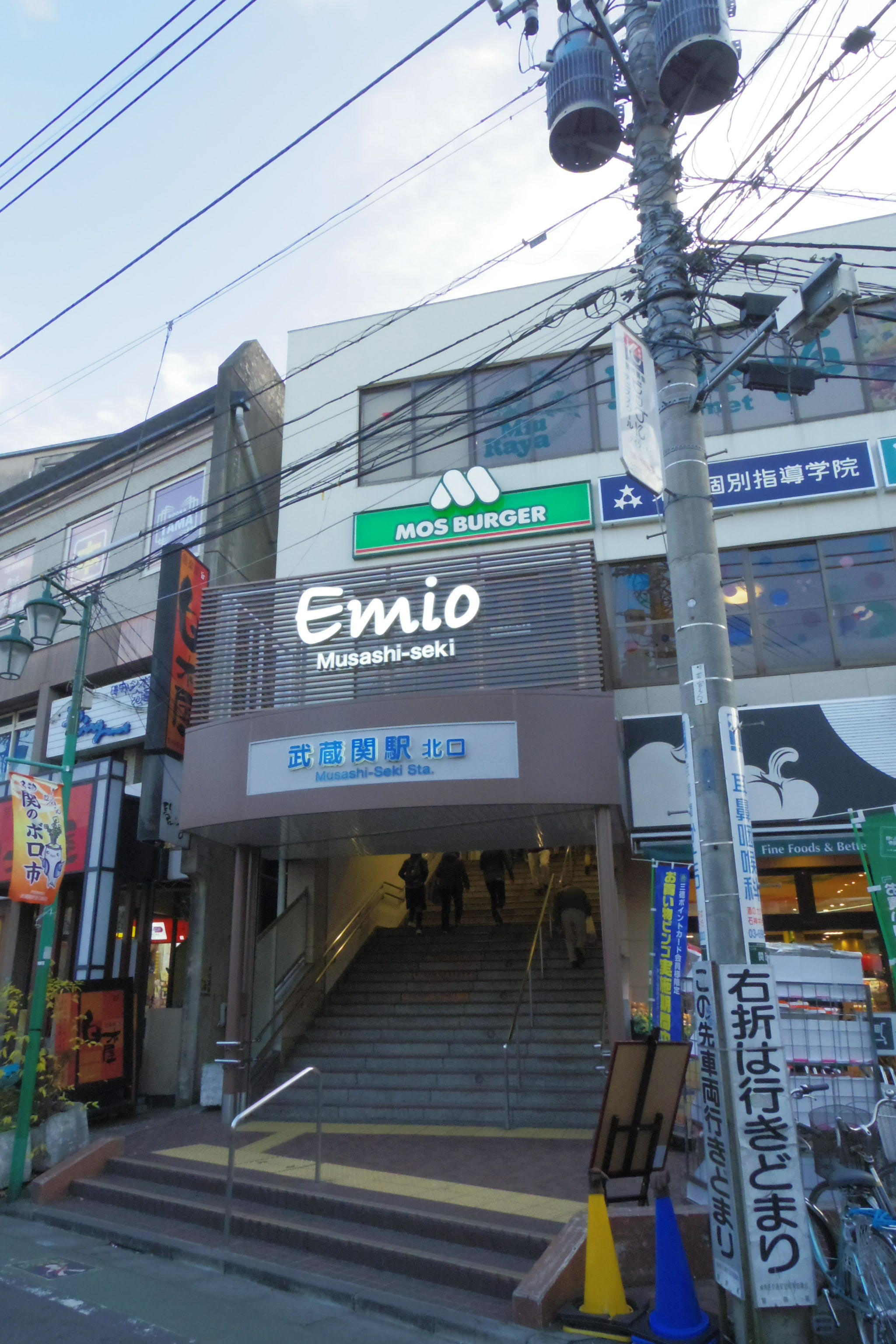 西武新宿線武蔵関駅北口。2015年12月12日撮影。